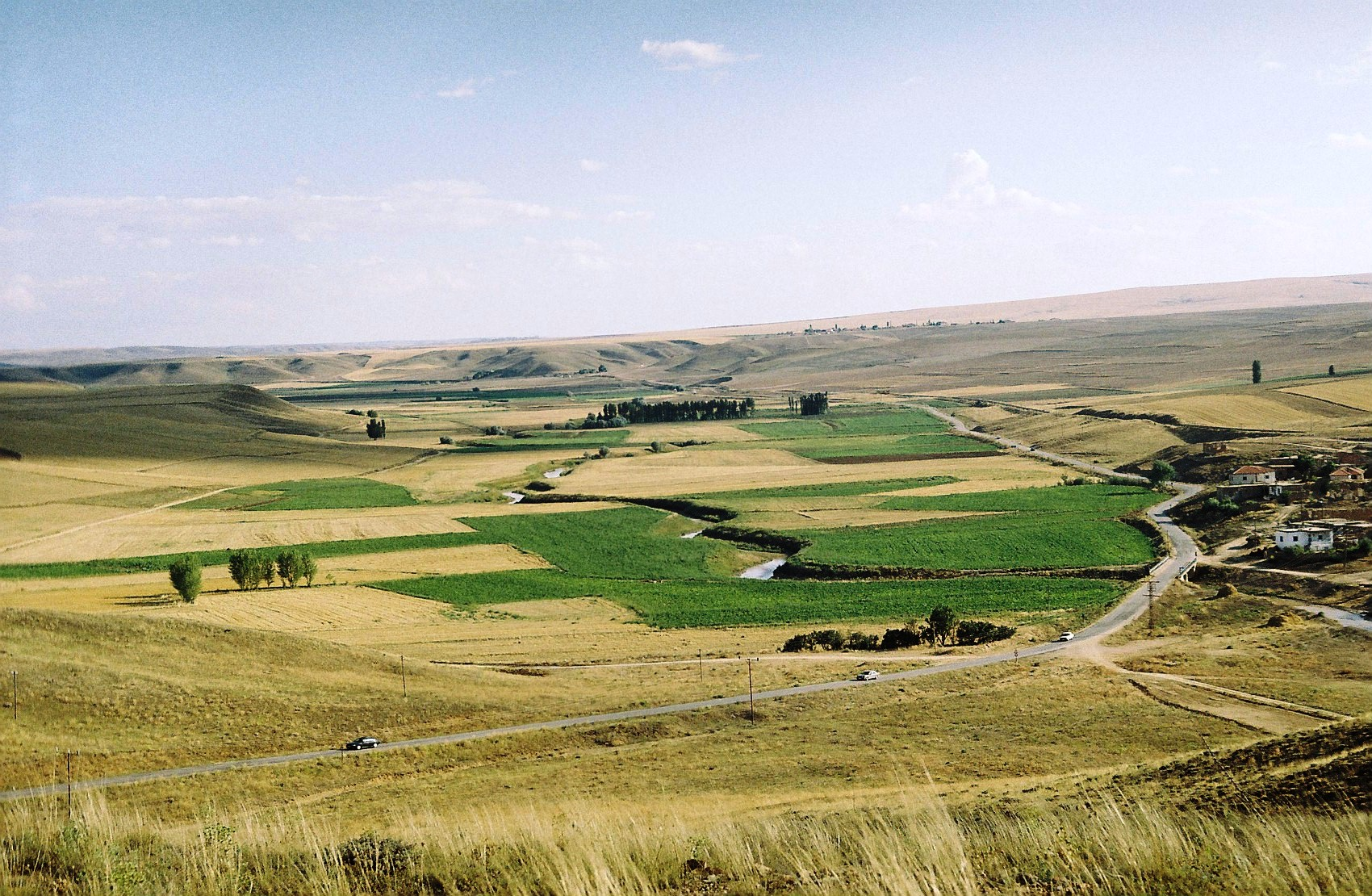 Yozgat'a bağlı Şefaatli ilçesinde bulunan Hamzalı köyünden bir görüntü.